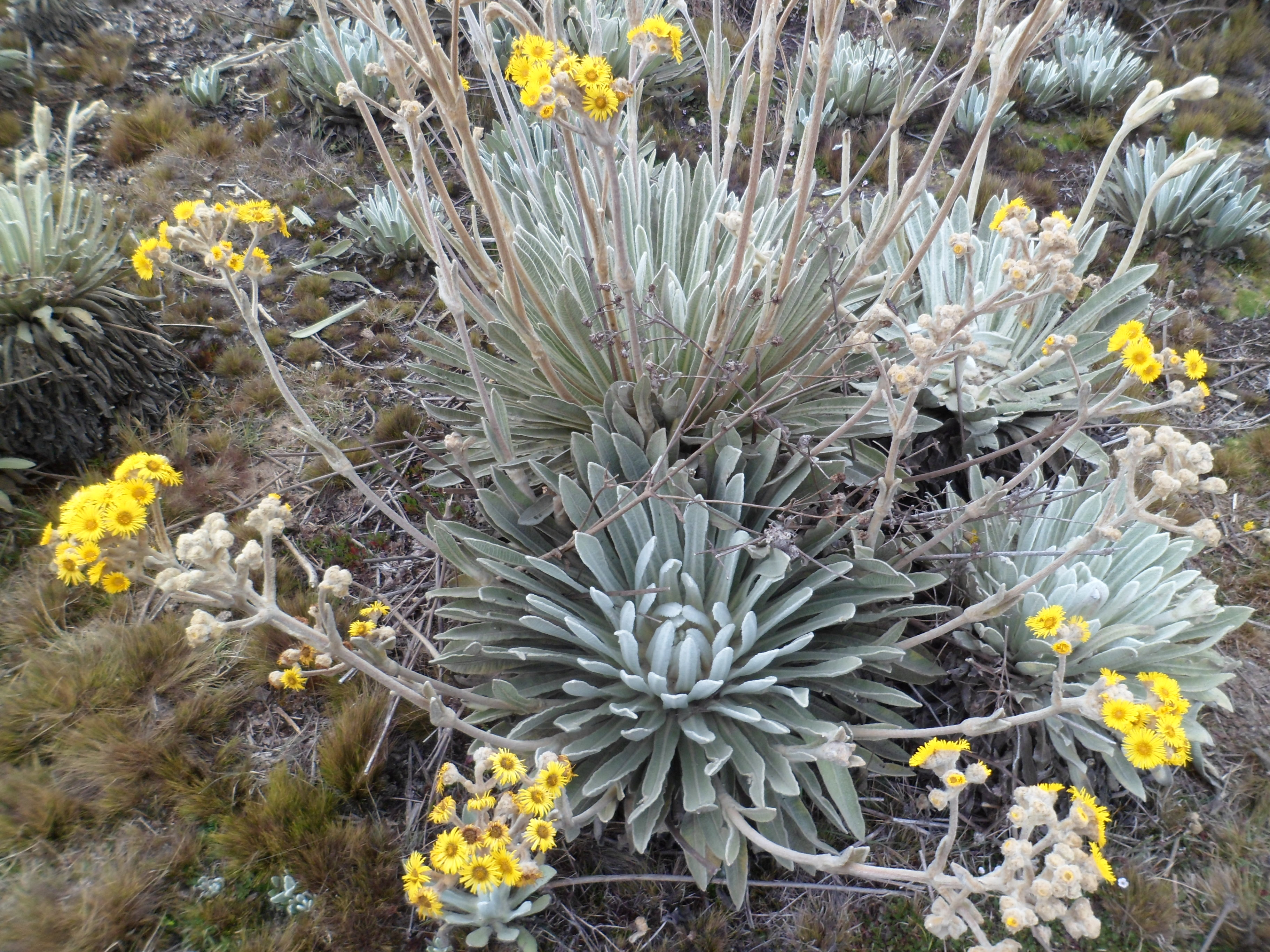 Flor tradicional y suertera del estado Mérida